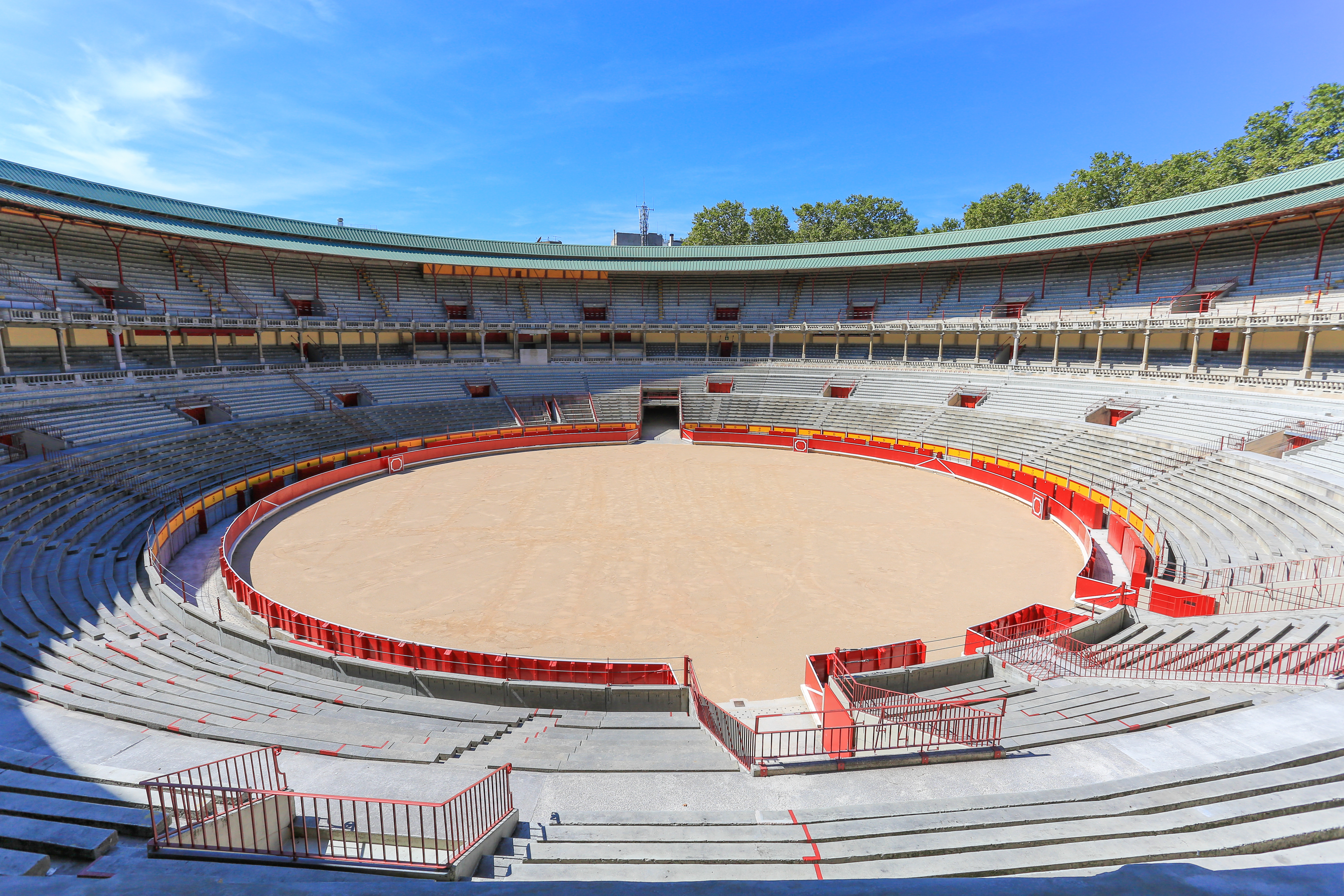 Interior de la Plaza de Toros de Pamplona